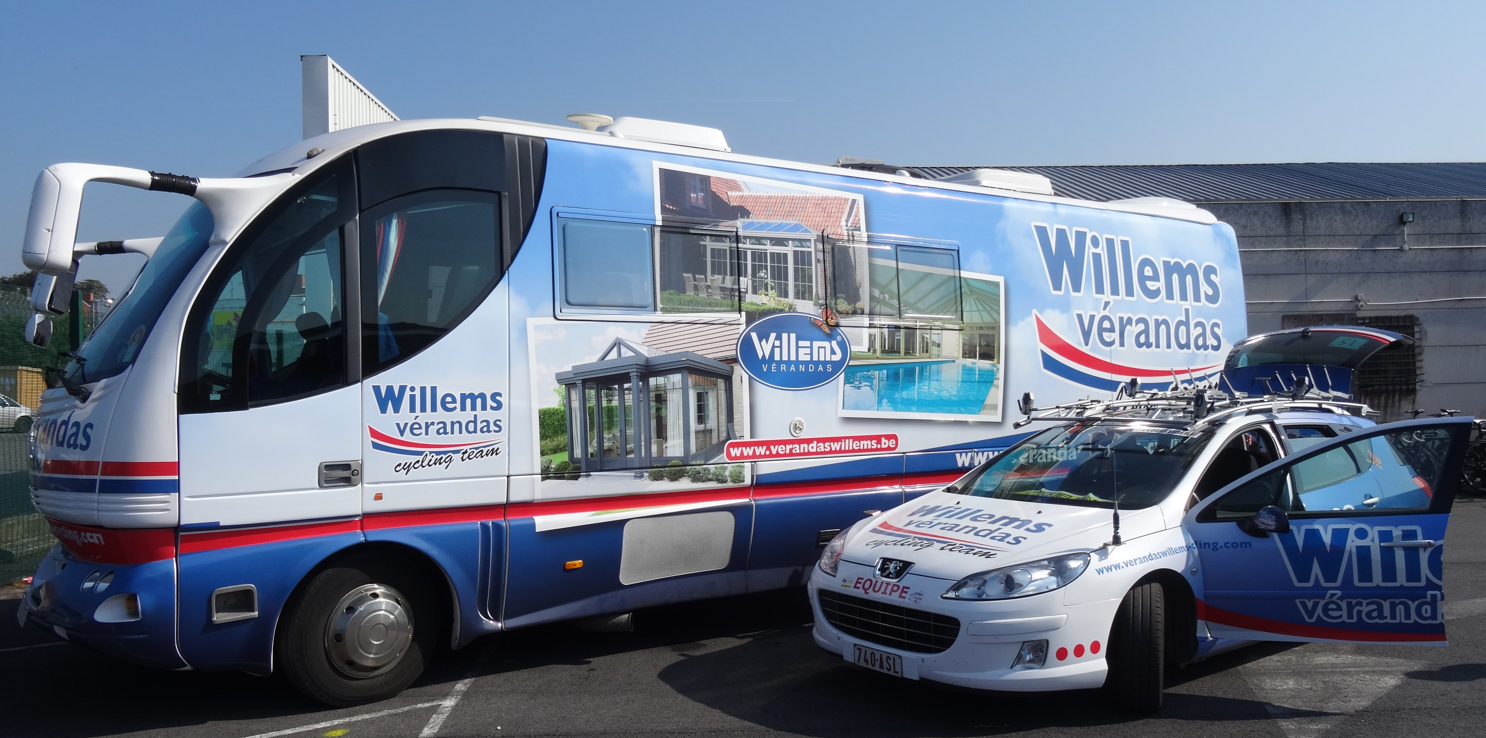 Reportage réalisé le samedi 17 mai à l'occasion du départ du Grand Prix Criquielion 2014 à Boussu, Belgique.